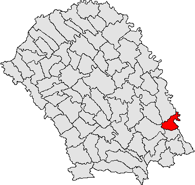 Categorie:Hărţi ale judeţului Botoşani